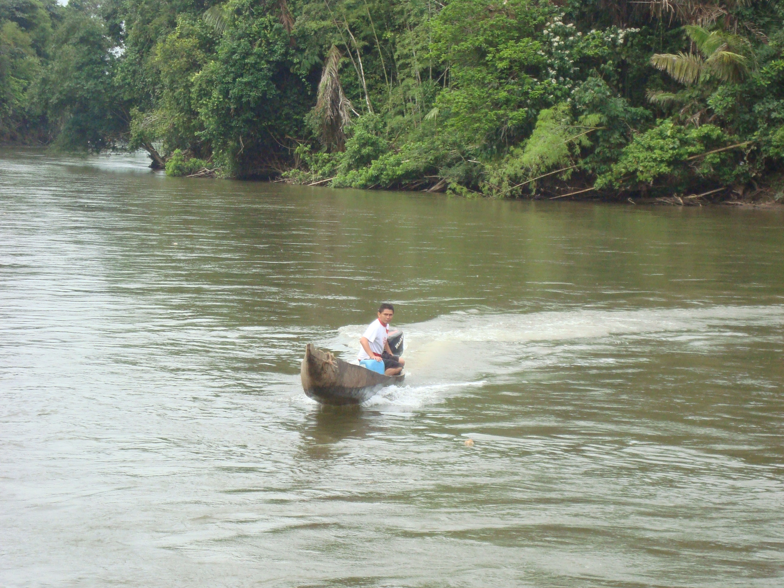 Puerto Arango, río Orteguaza en Florencia (Caquetá)